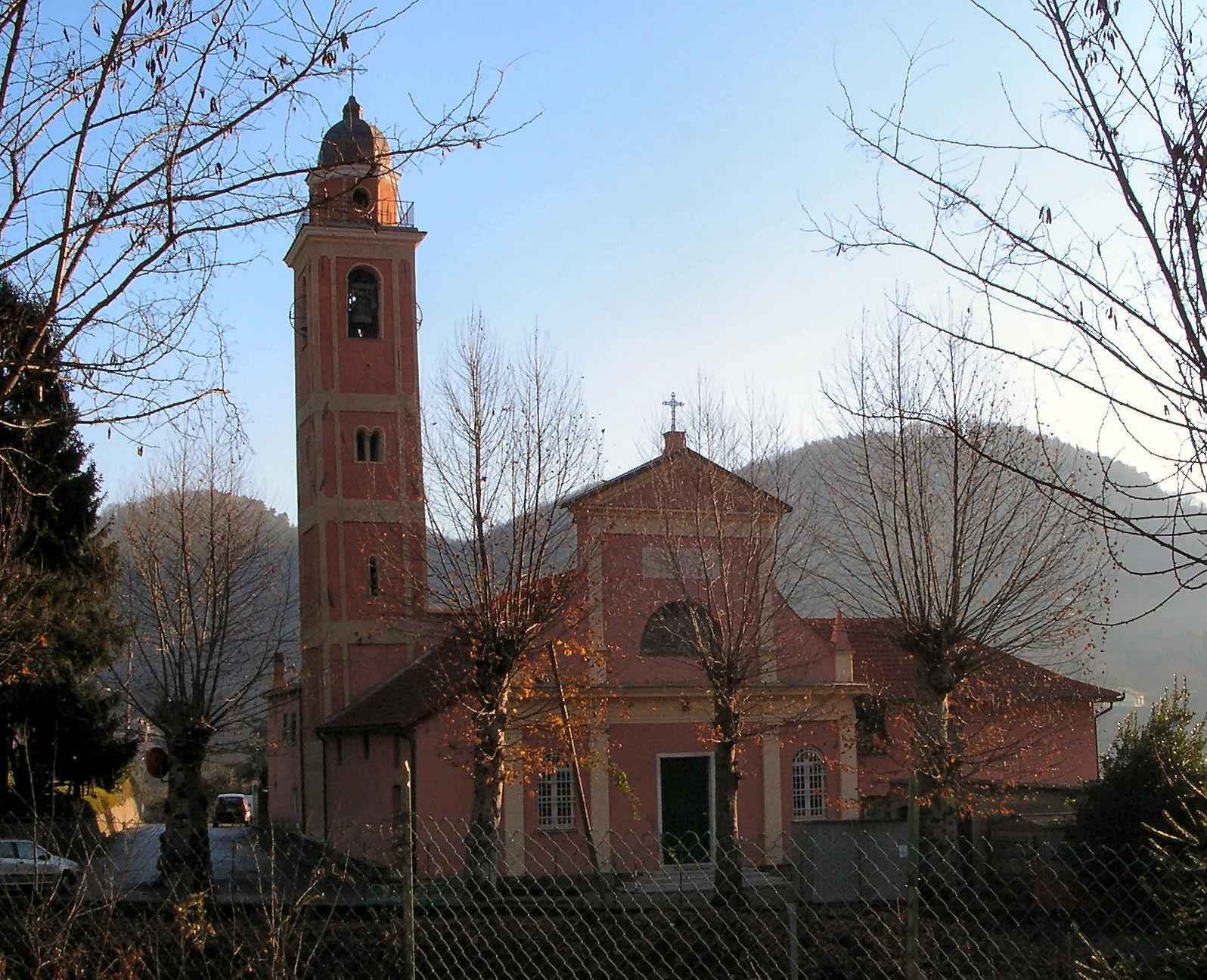 Chiesa Sant'Ambrogio di Mignanego (Genova) foto propria Dicembre 2008